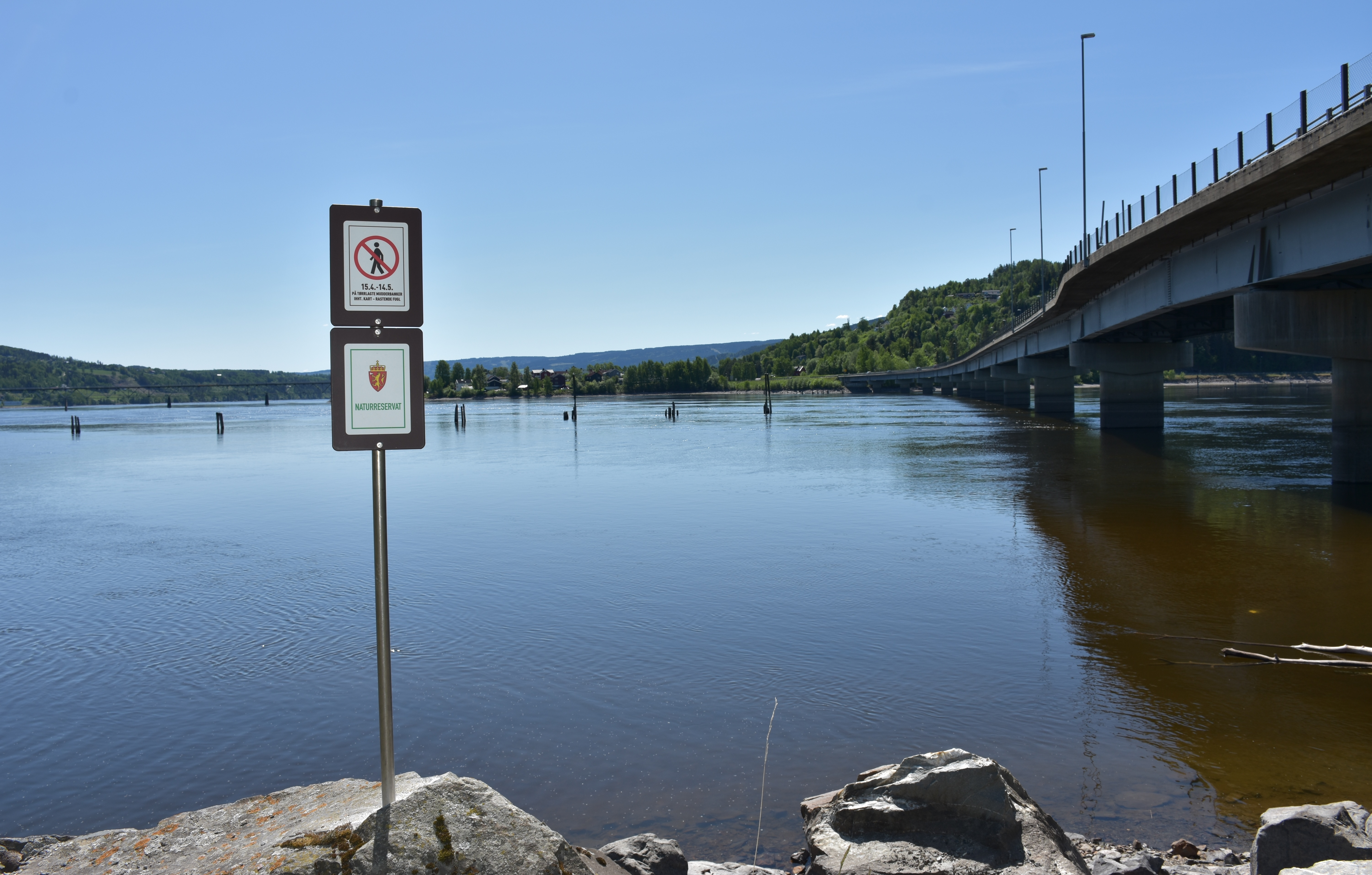 Lågendeltaet naturreservat, her ved Lillehammer bru